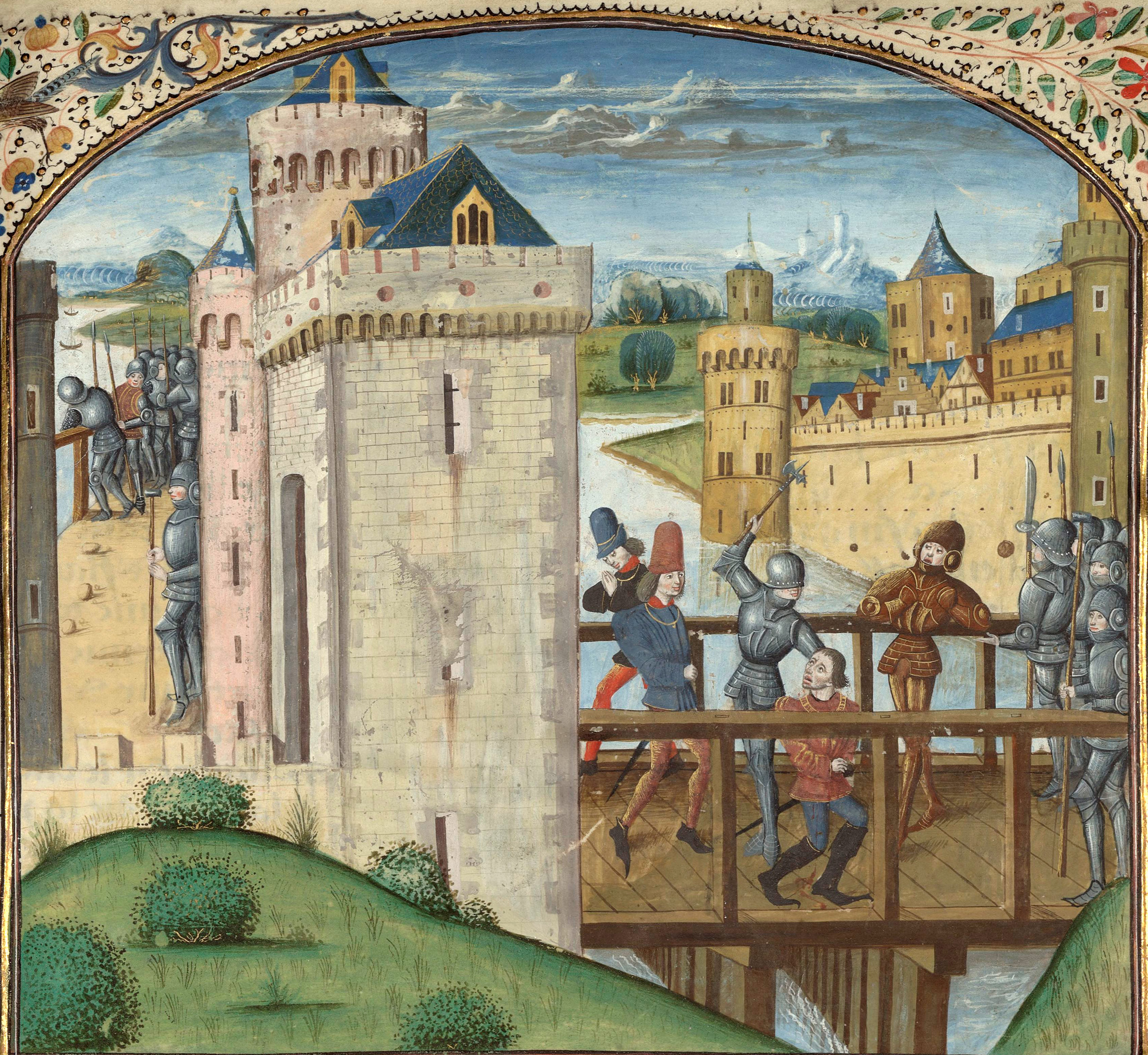 Assassinat du duc Jean sans peur sur le pont de Montereau. Enluminure ornant la chronique d'Enguerrand de Monstrelet, XVe siècle.